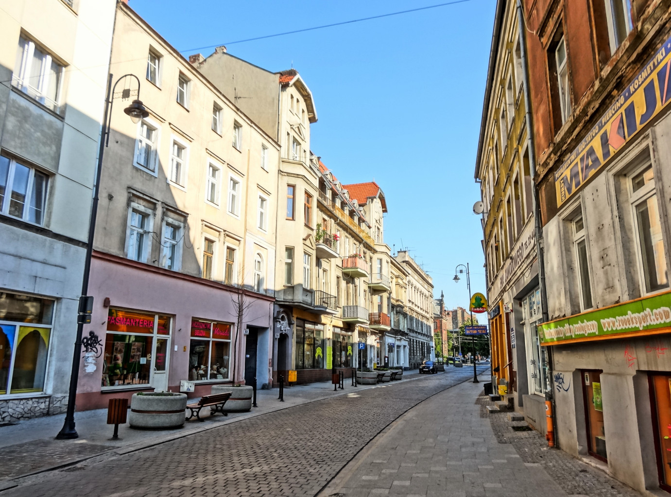 Ulica Dworcowa w Bydgoszczy na odcinku od ul. Marcinkowskiego do ul. Królowej Jadwigi